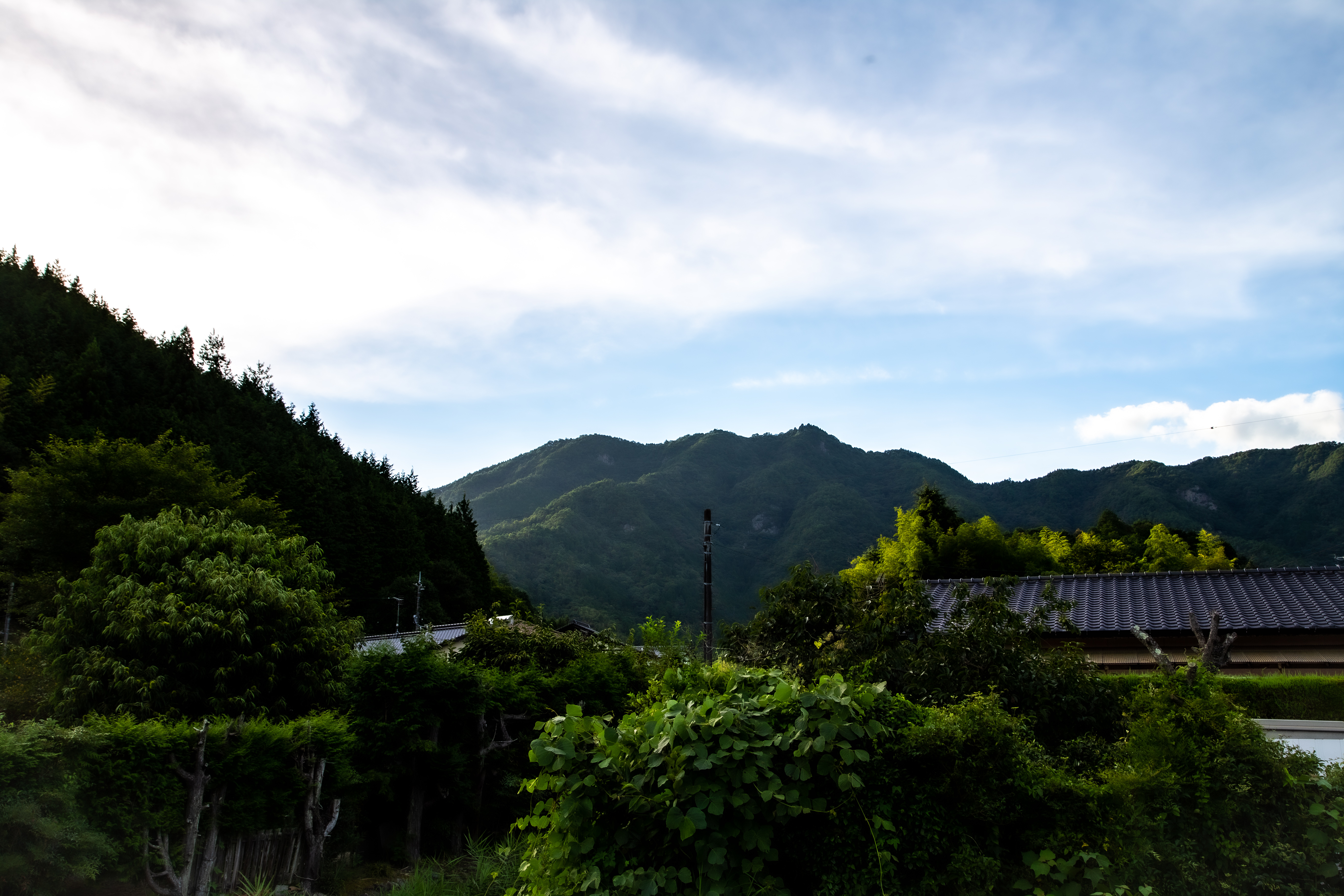 山口県岩国市の蓮華山、中世には蓮華山城という城があった。